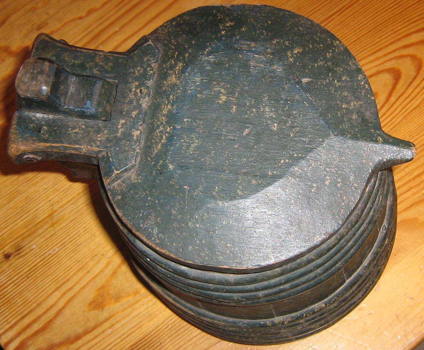 Laggad träkanna i ek, av det slag som skulle kunna kallas stånka.